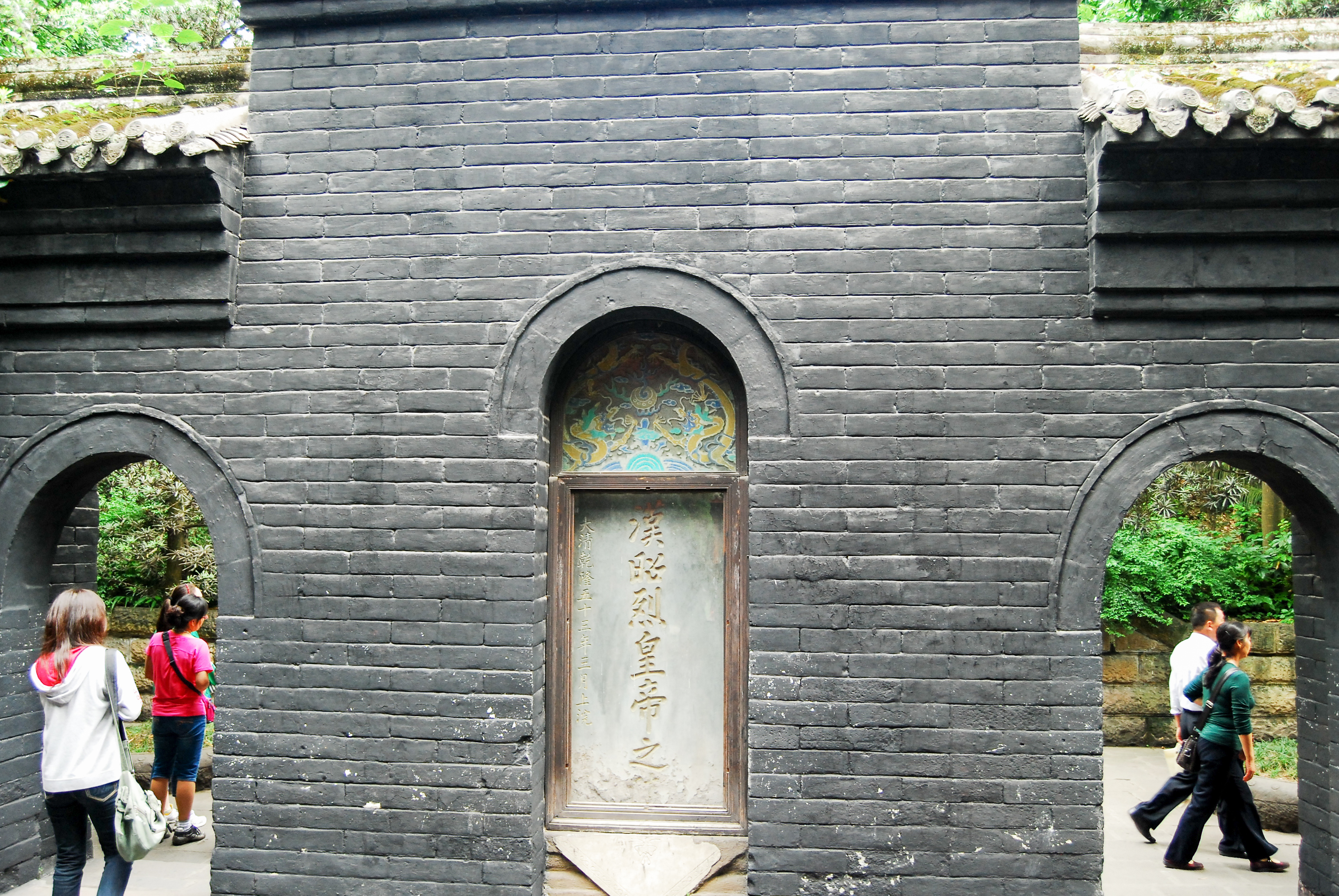 中文（中国大陆）: 成都武侯祠刘备墓